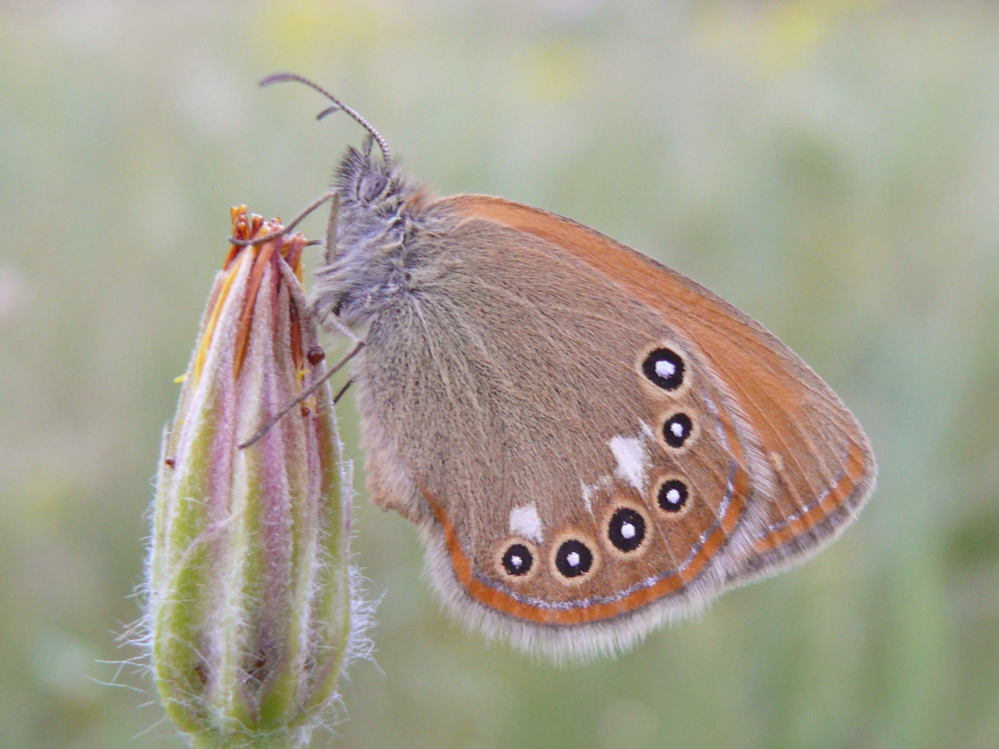 Coenonympha glycerion